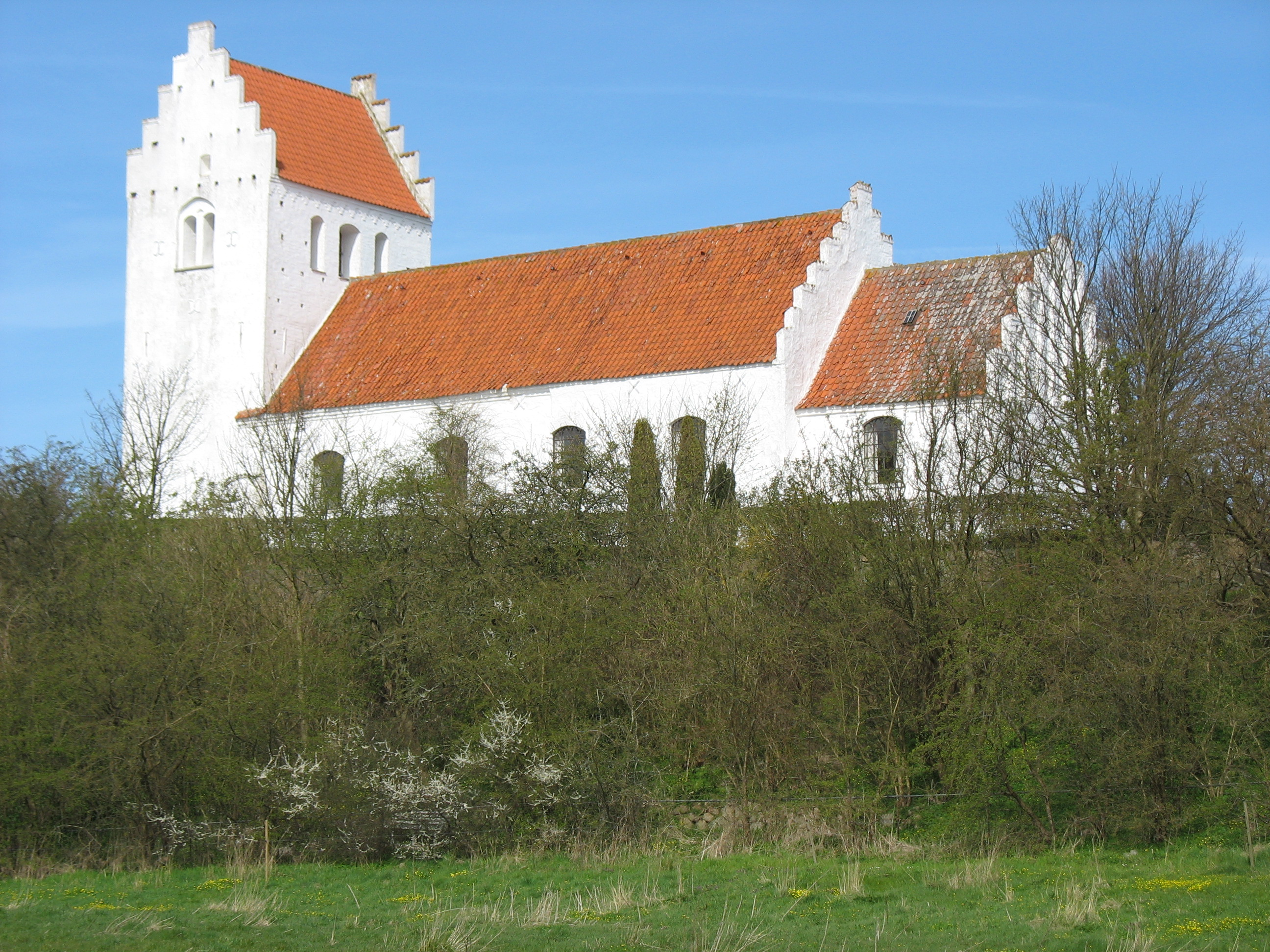 Fårevejle Kirke